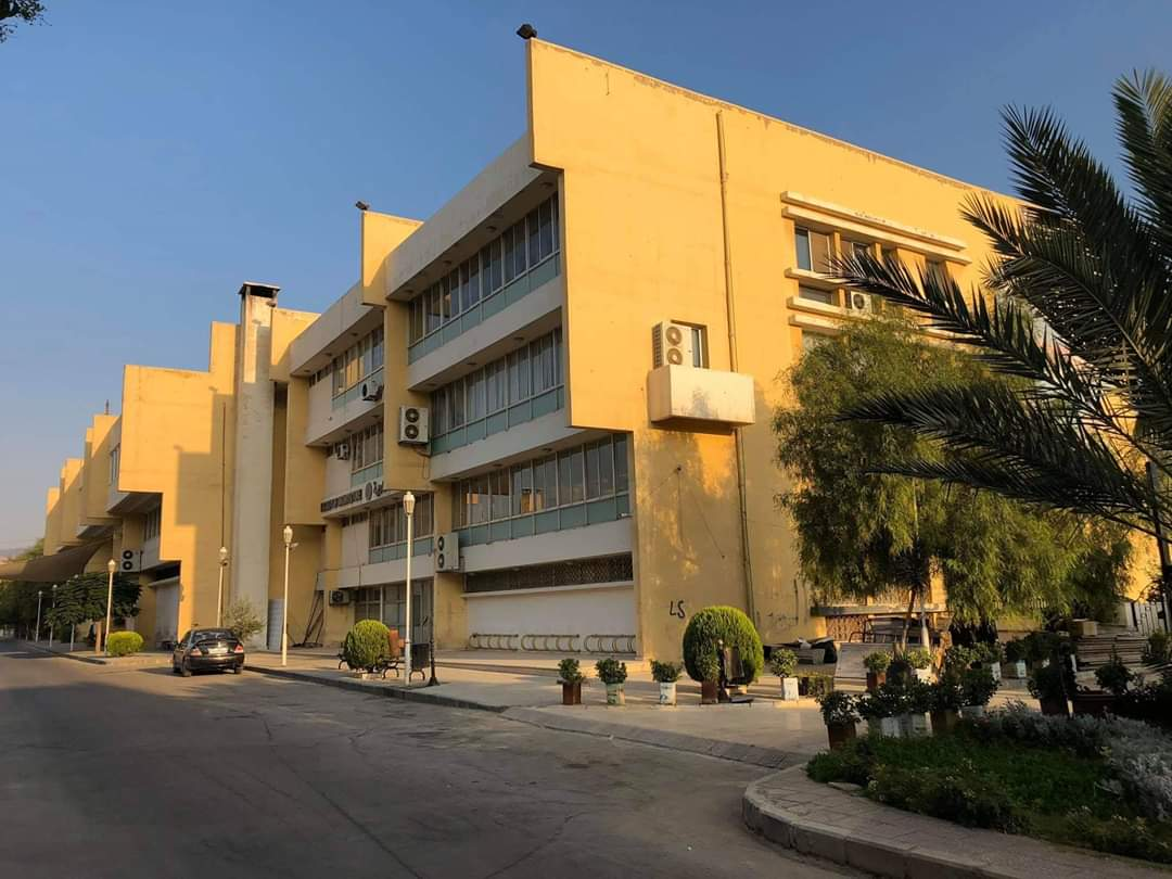 يظهر قسم التوسع و المبنى الرئيسي بجواره